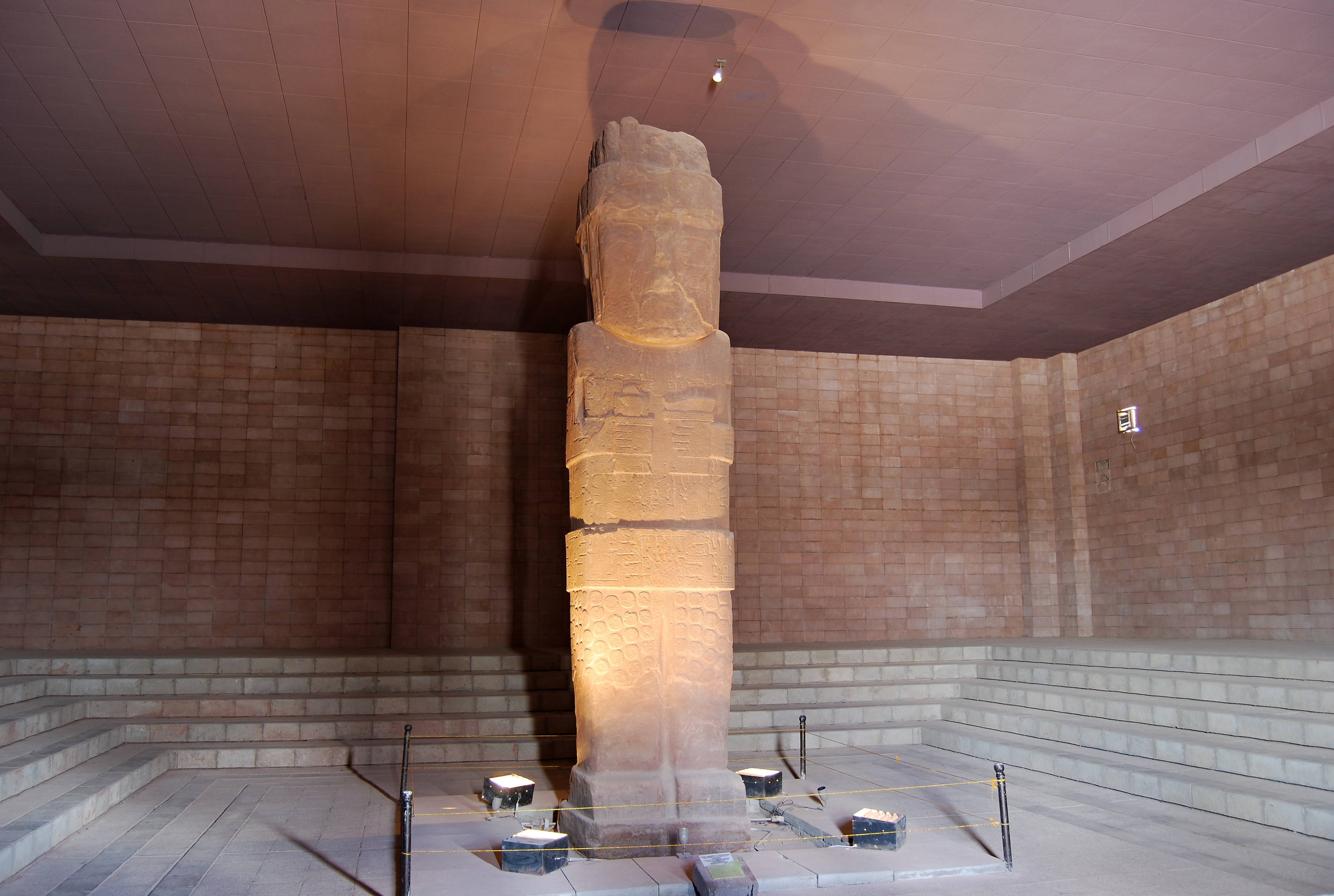 Tiwanaku - muzeum